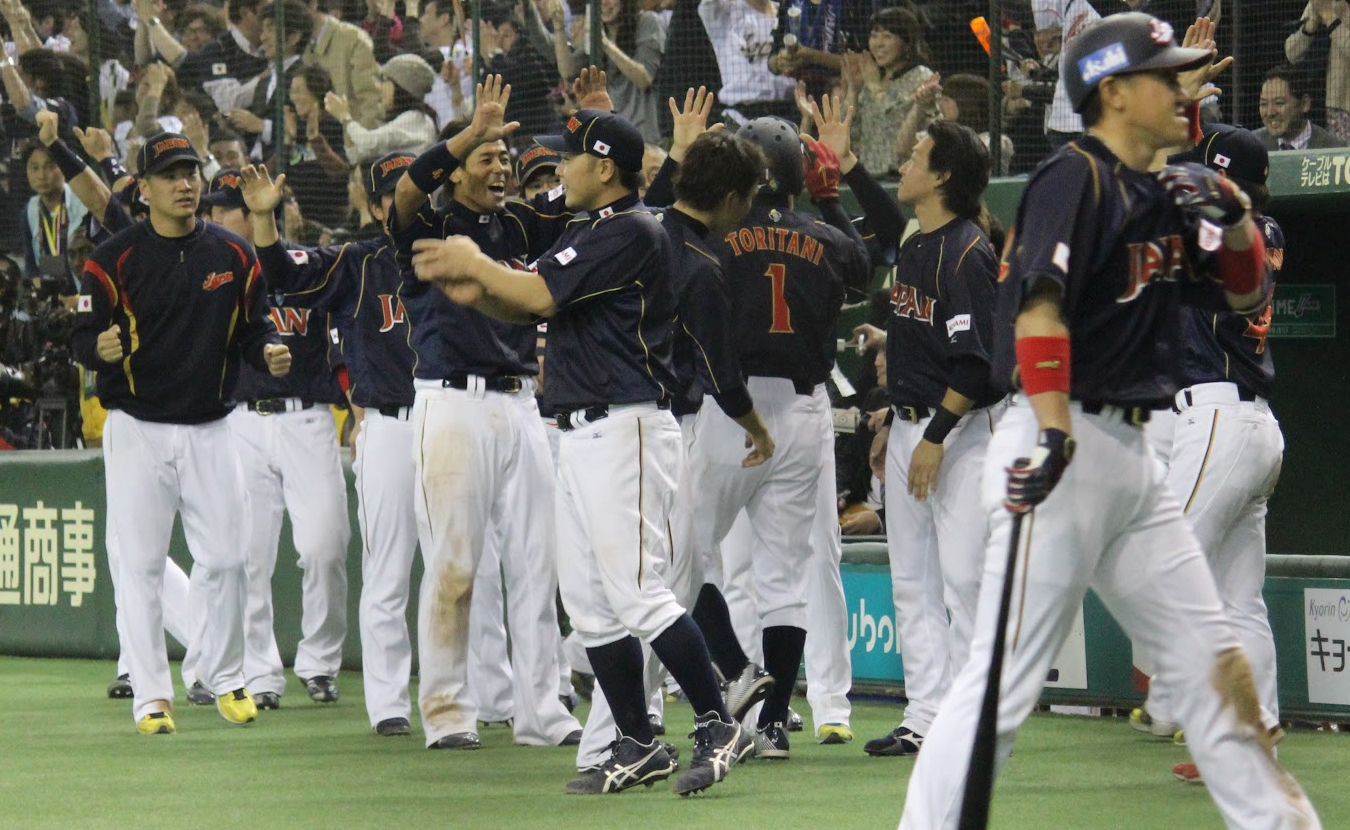 Japan national baseball team